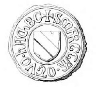 Rundsiegel des Markgrafen Otto II. von Baden-Hachberg von 1412 und 1413 mit dem Schild in spanischer Form